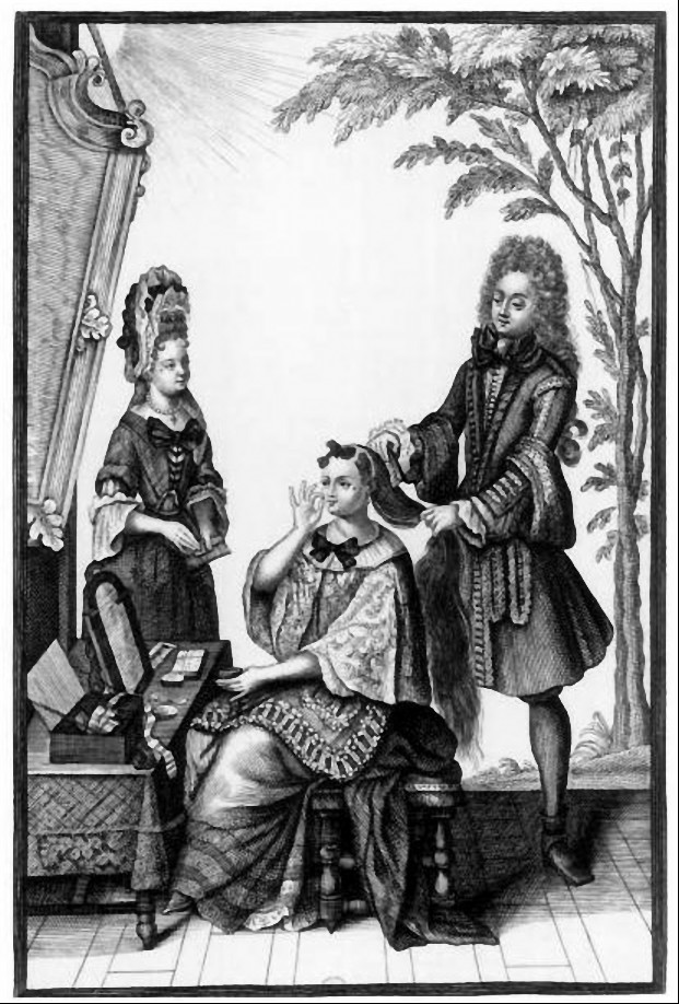 Kupferstich "Le Matin". Darstellung einer Dame mit Schönheitspflästerchen (mouches) bei der Morgentoilette.